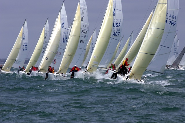 J/80 an der Startlinie